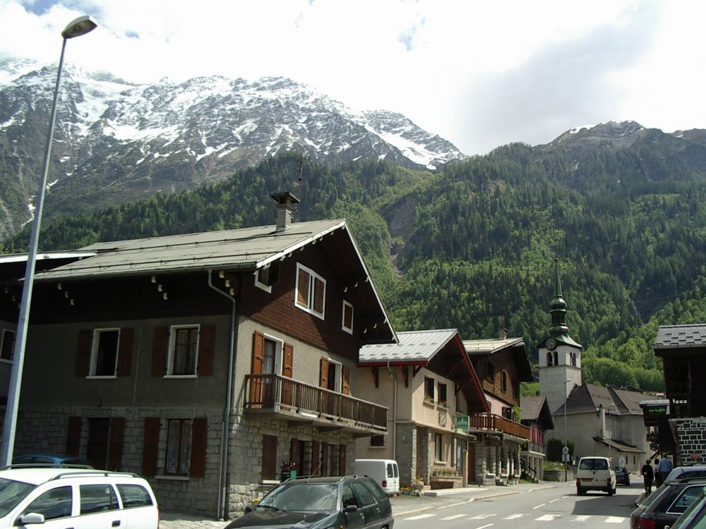 Les Houches, Haute-Savoie (France) Author: Rémi Stosskopf Date: 04 June 2006